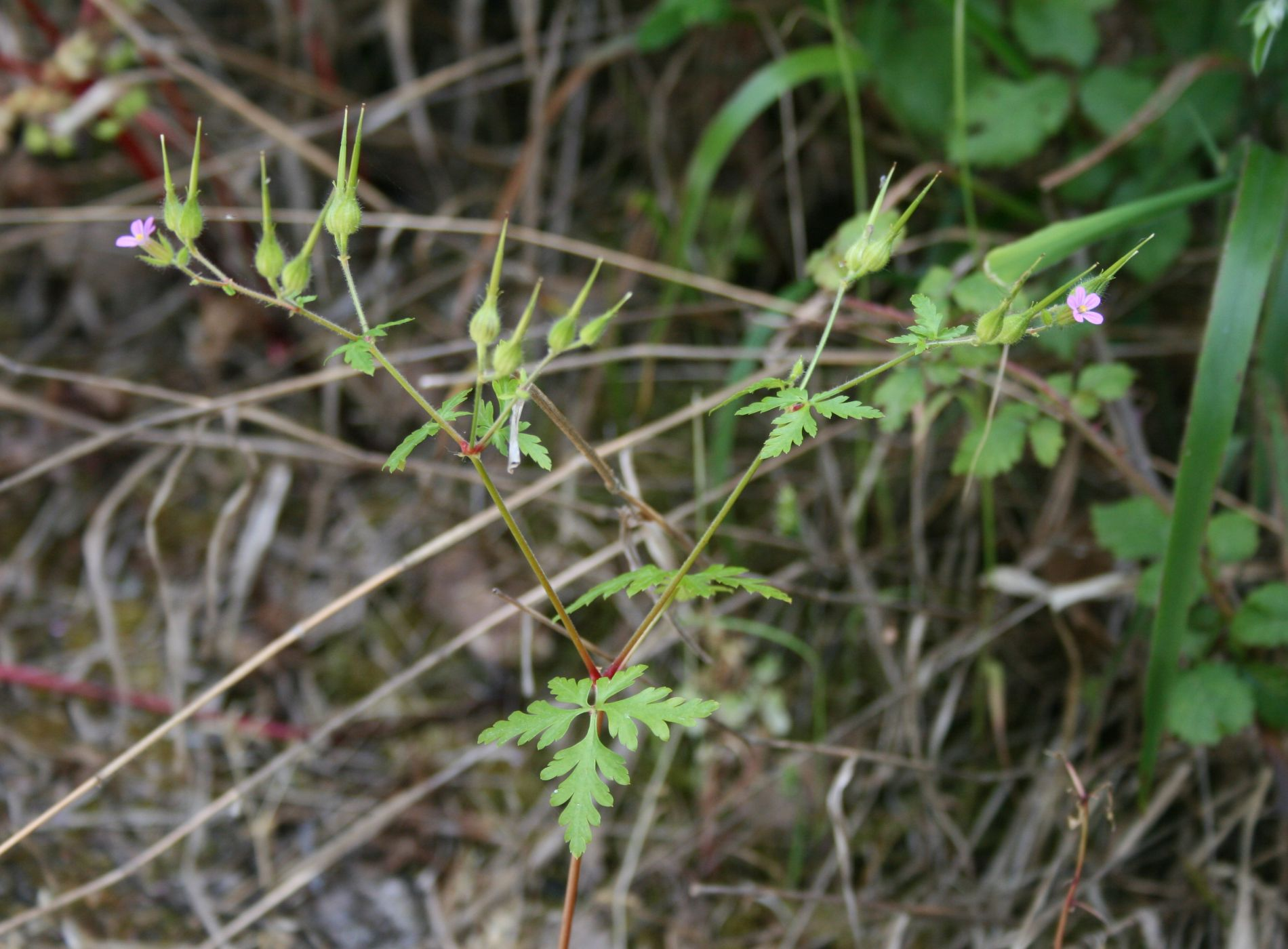 Geranium purpureum, Storchschnabelgewächse (Geraniaceae) - Italien/Italia/Italy: Kalabrien/Calabria, Prov. Reggio Calabria, Aspromonte, bei San Peri, SSE Scilla